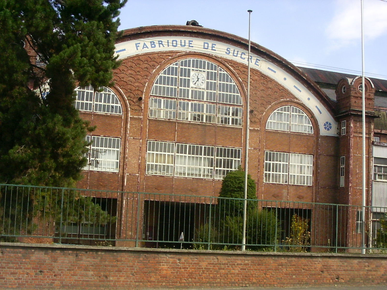 Eppeville, suikerfabriek